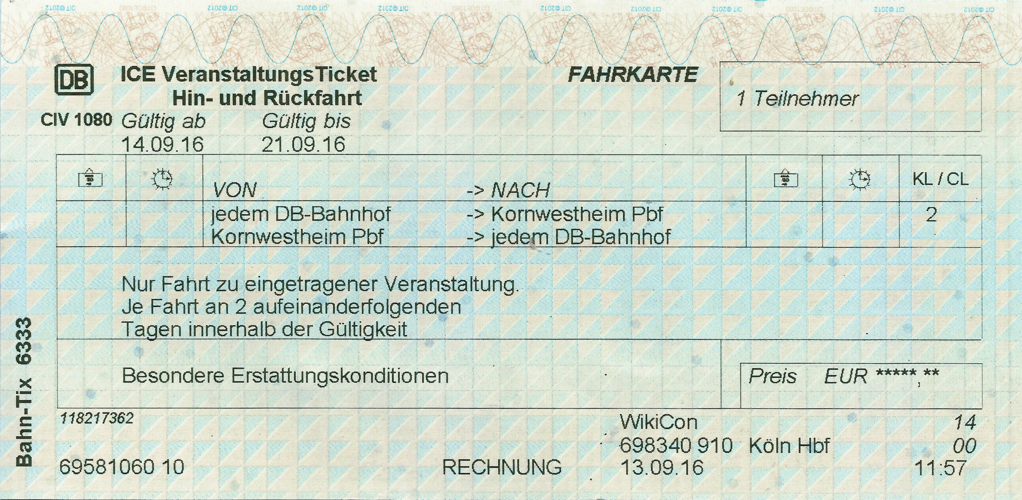 ICE VeranstaltungsTicket der Deutschen Bahn AG von jedem Bahnhof in Deutschland nach Kornwestheim zur WikiCon 2016. Ausgestellt als „BahnTix“ an einem Fahrausweisautomaten